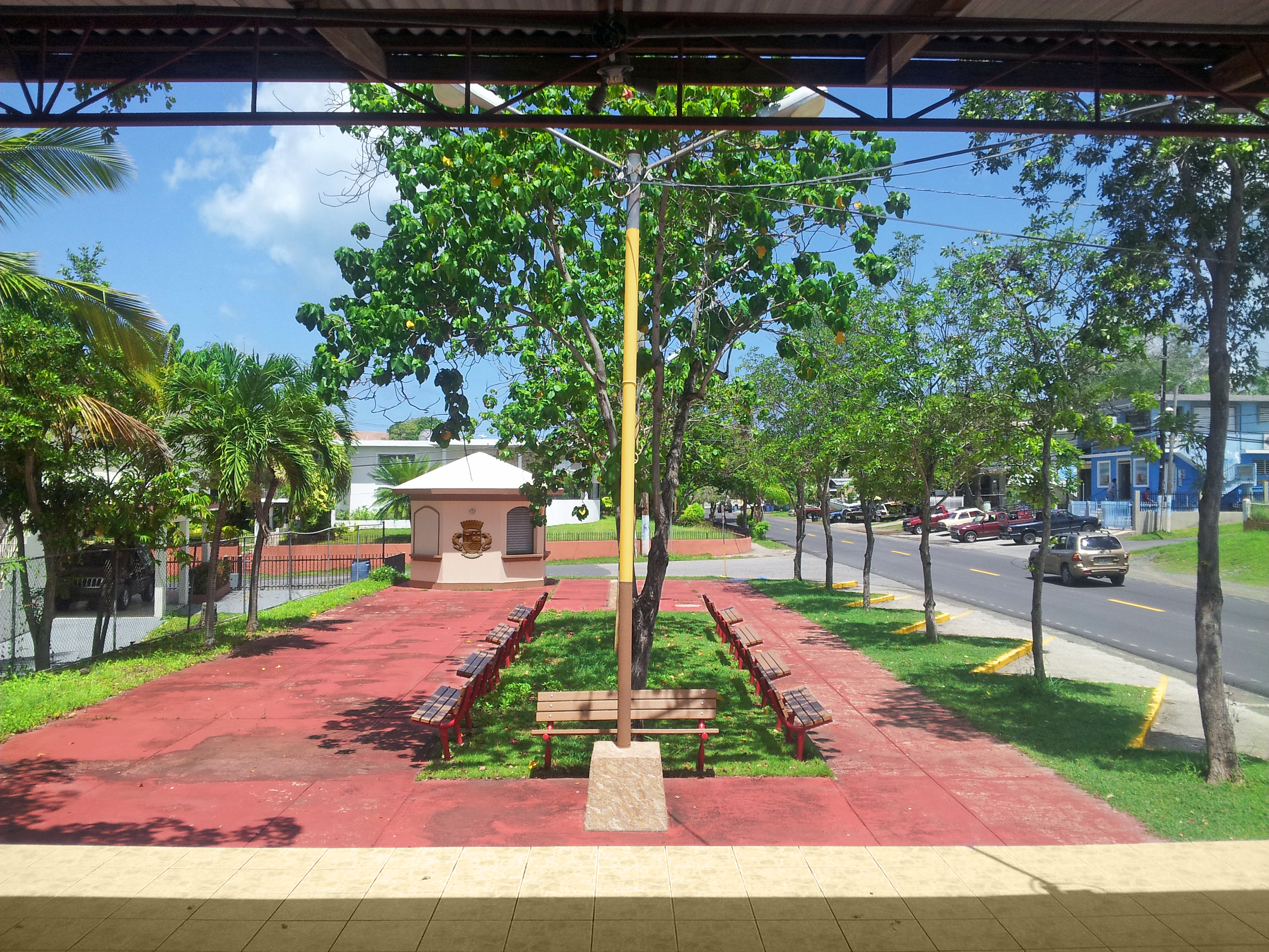 Plaza Cofresí, Boquerón